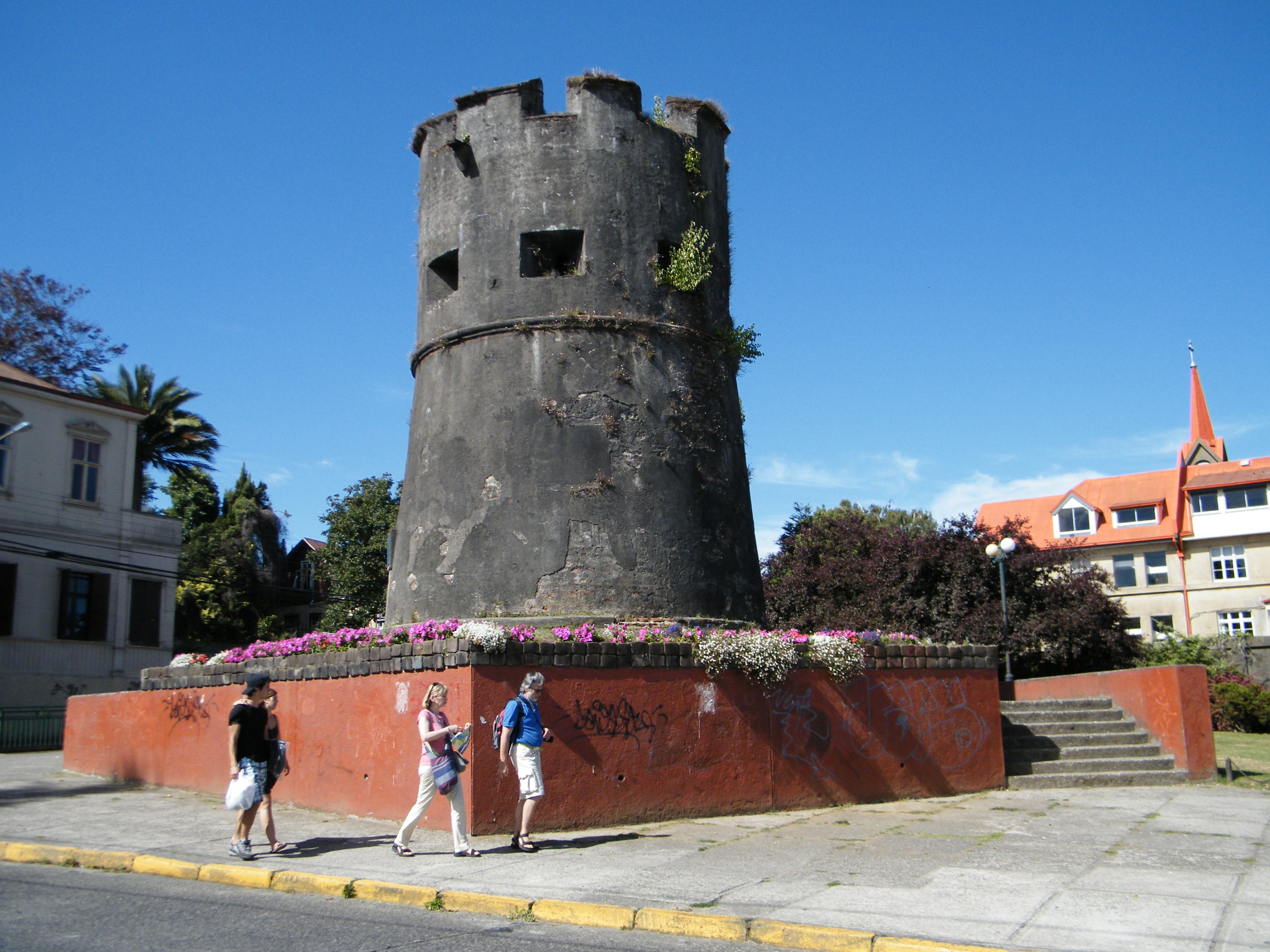 Torreón Los Canelos This is a photo of a national monument in Chile: 173